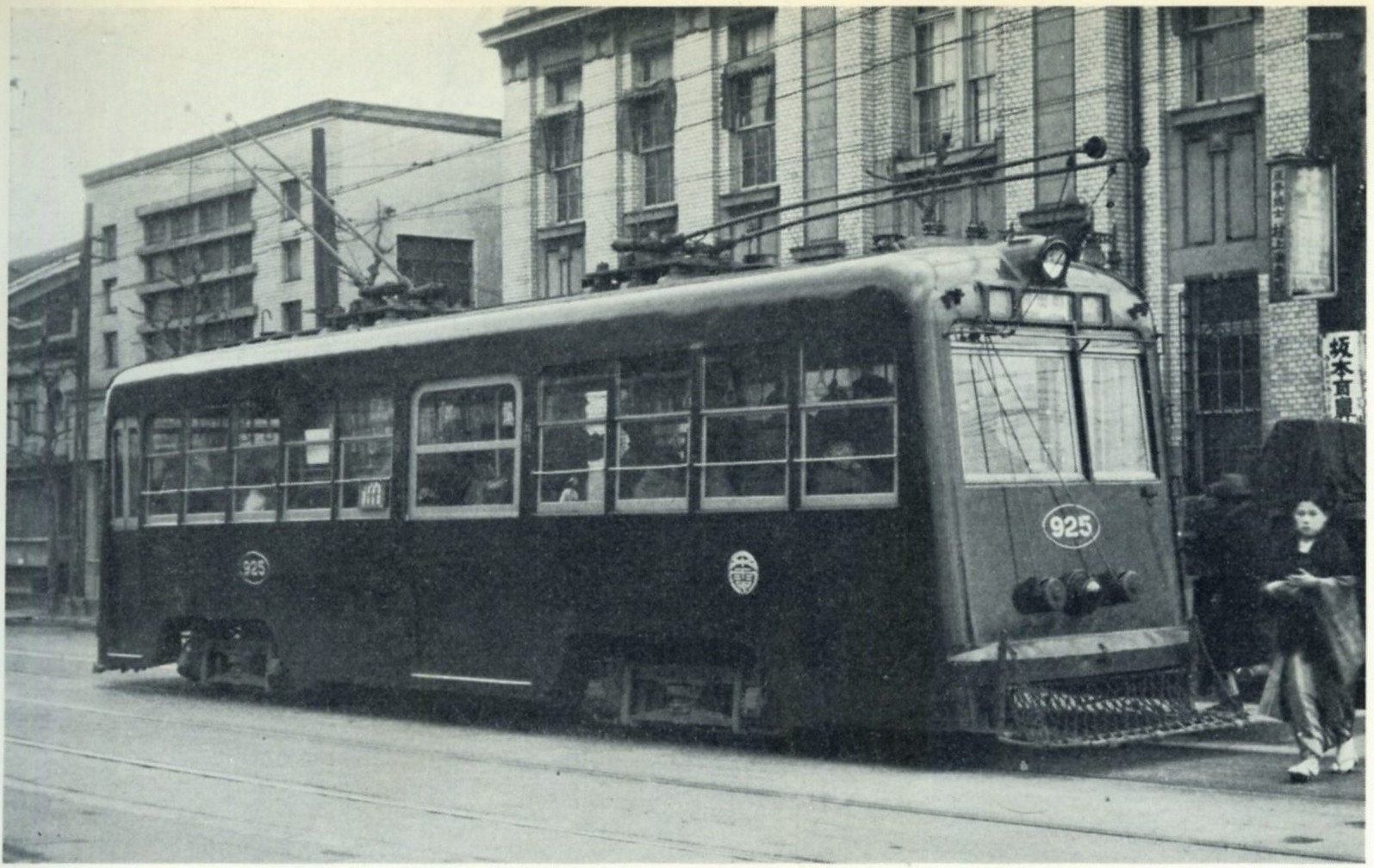 大阪市電901形925。昭和15年、北堀江通にて。背後に村上眼科、坂本耳鼻科の看板が見える。